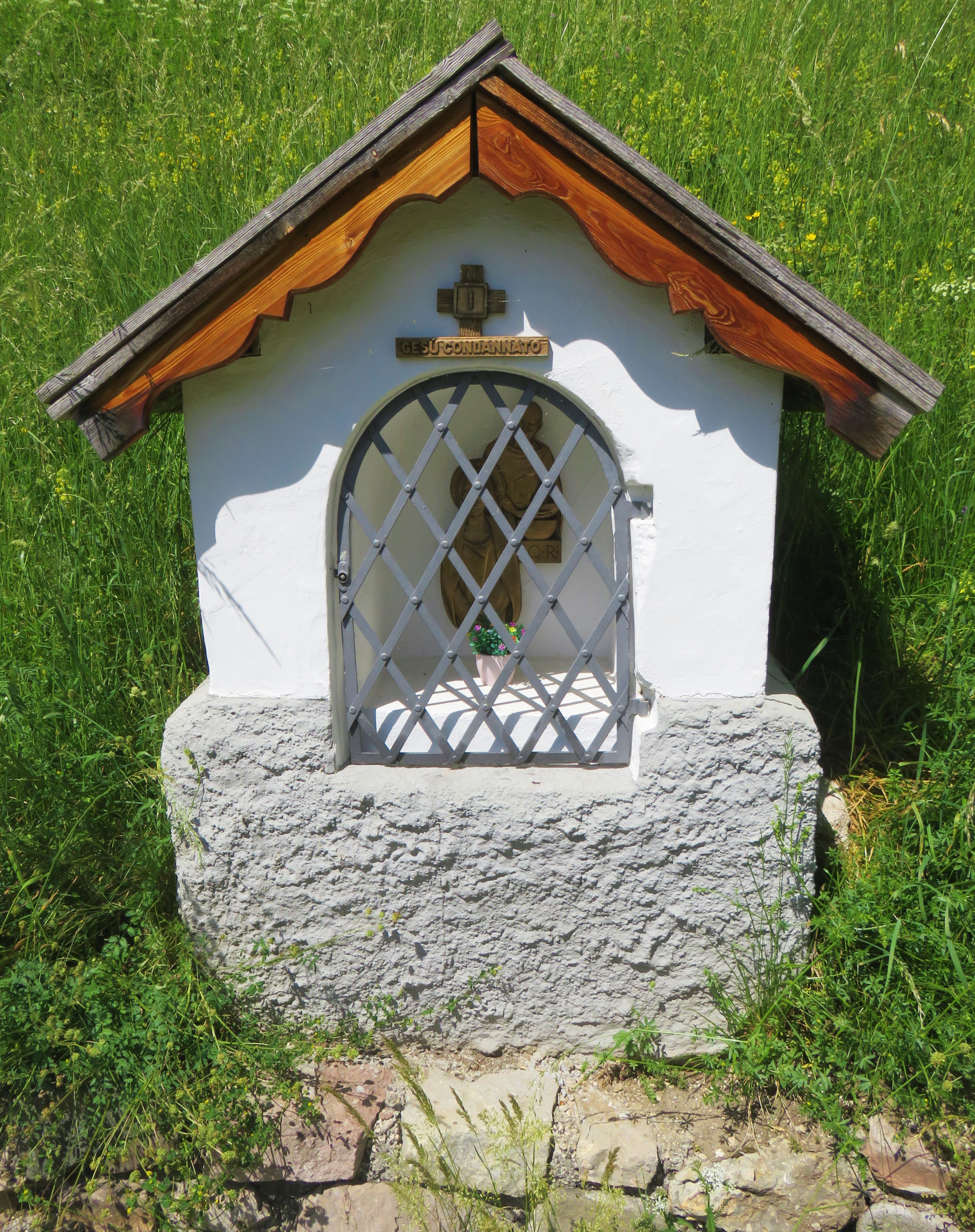 I stazione della Via Crucis che dalla chiesa dei Santi Filippo e Giacomo a Campitello di Fassa sale in direzione di strada di Pian. Da qui poi si può proseguire per val Duron.